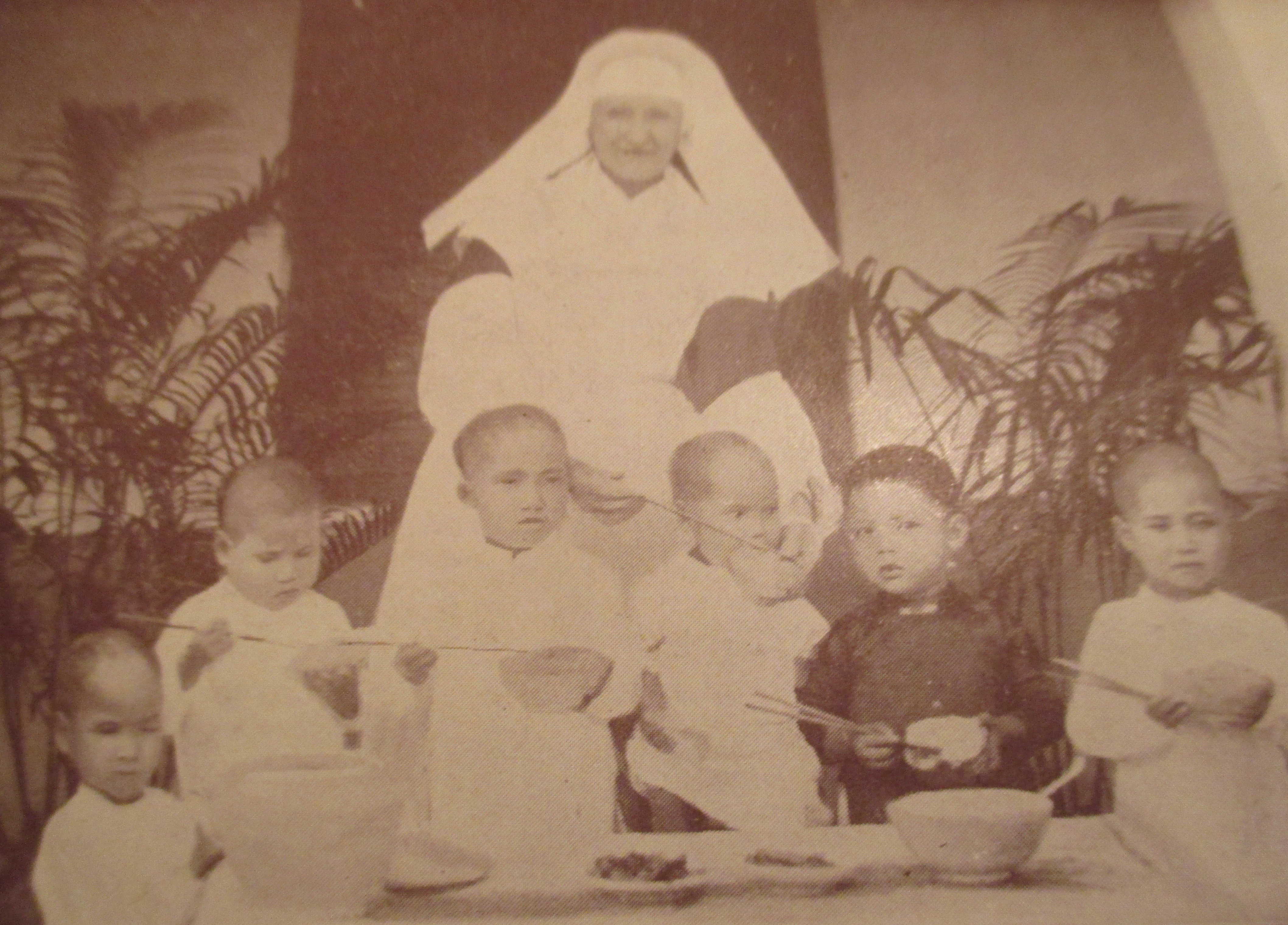 Orphelinat de la Sainte-Enface de Nam-dinh (Tonkin), tenu par les Sœurs de Saint-Paul de Chartres.